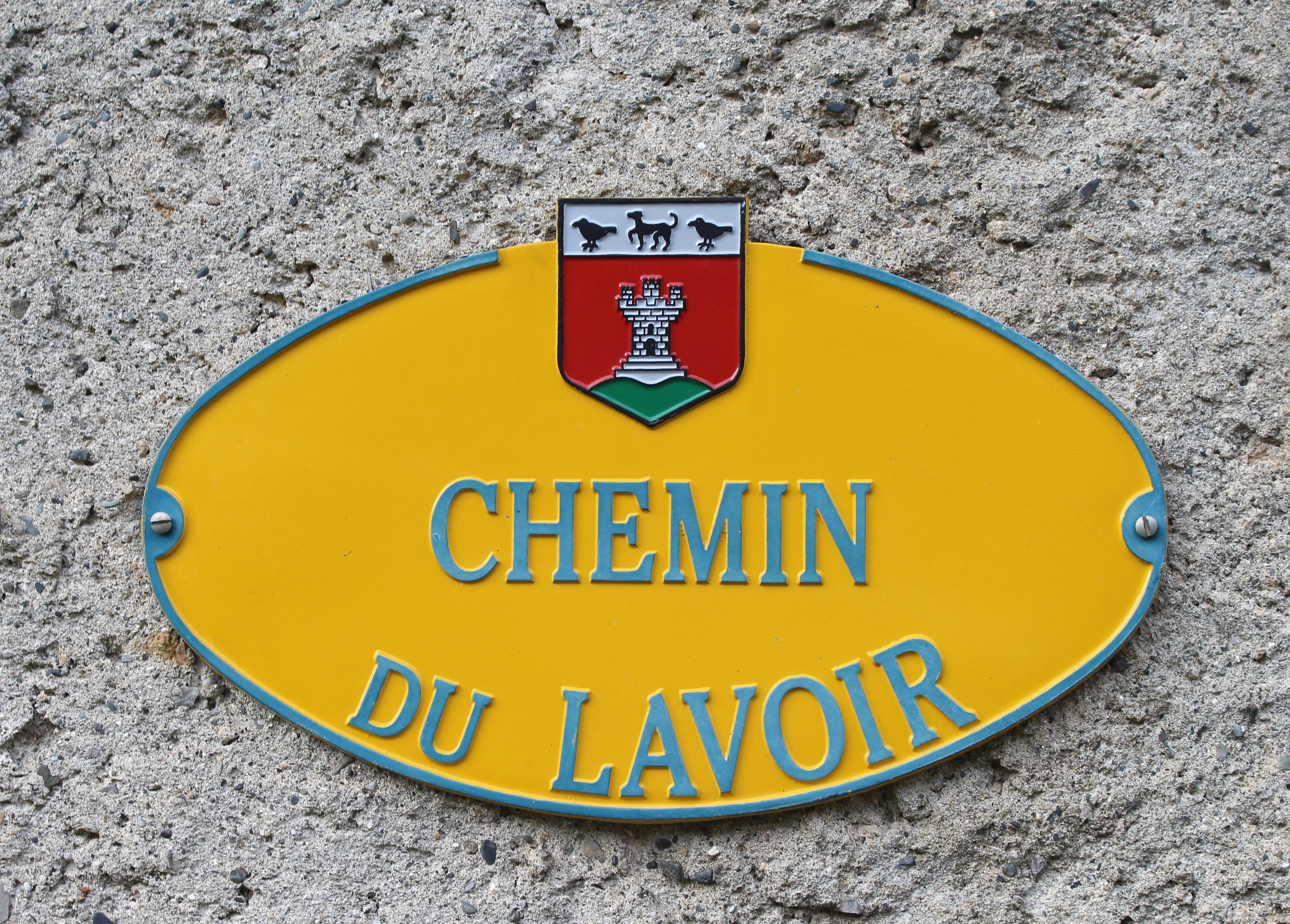 "Chemin du Lavoir" à Berbérust-Lias (Hautes-Pyrénées, Occitanie, France).